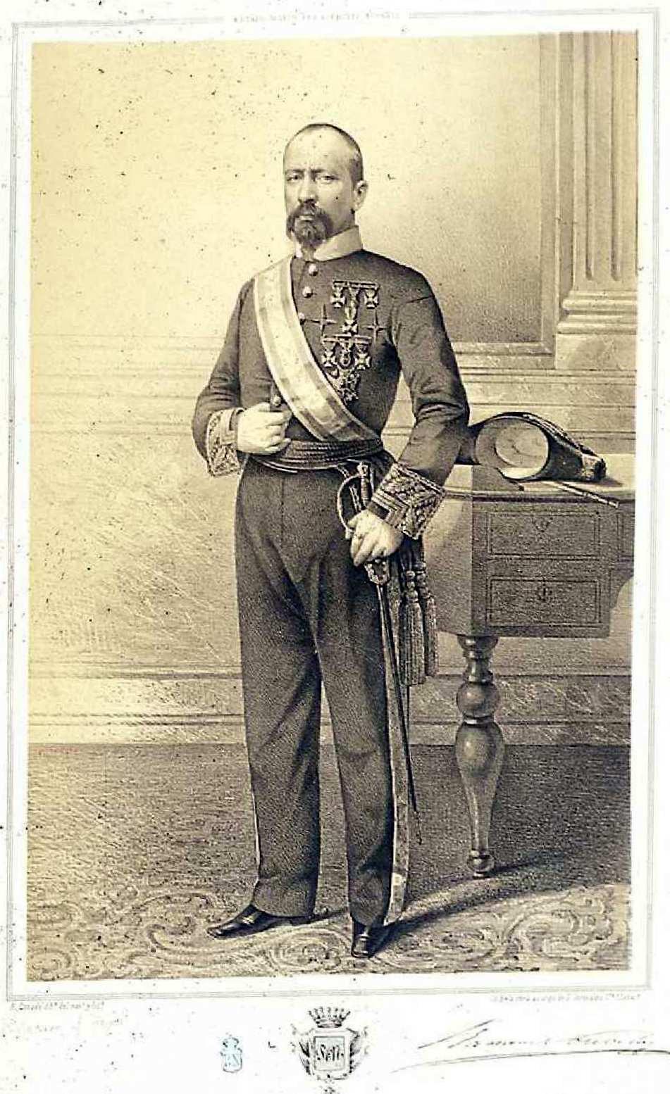 Ramón Nouvilas y Rafols, litografía de Rufino Casado, ilustración de Estado Mayor del Ejército Español, de Pedro Chamorro y Baquerizo. Biblioteca Nacional de España